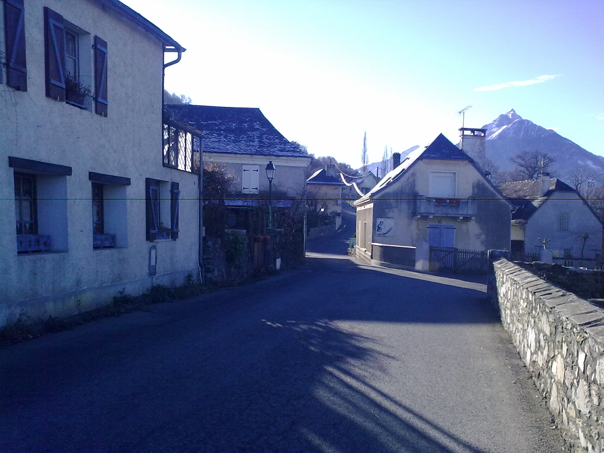 Arbouix